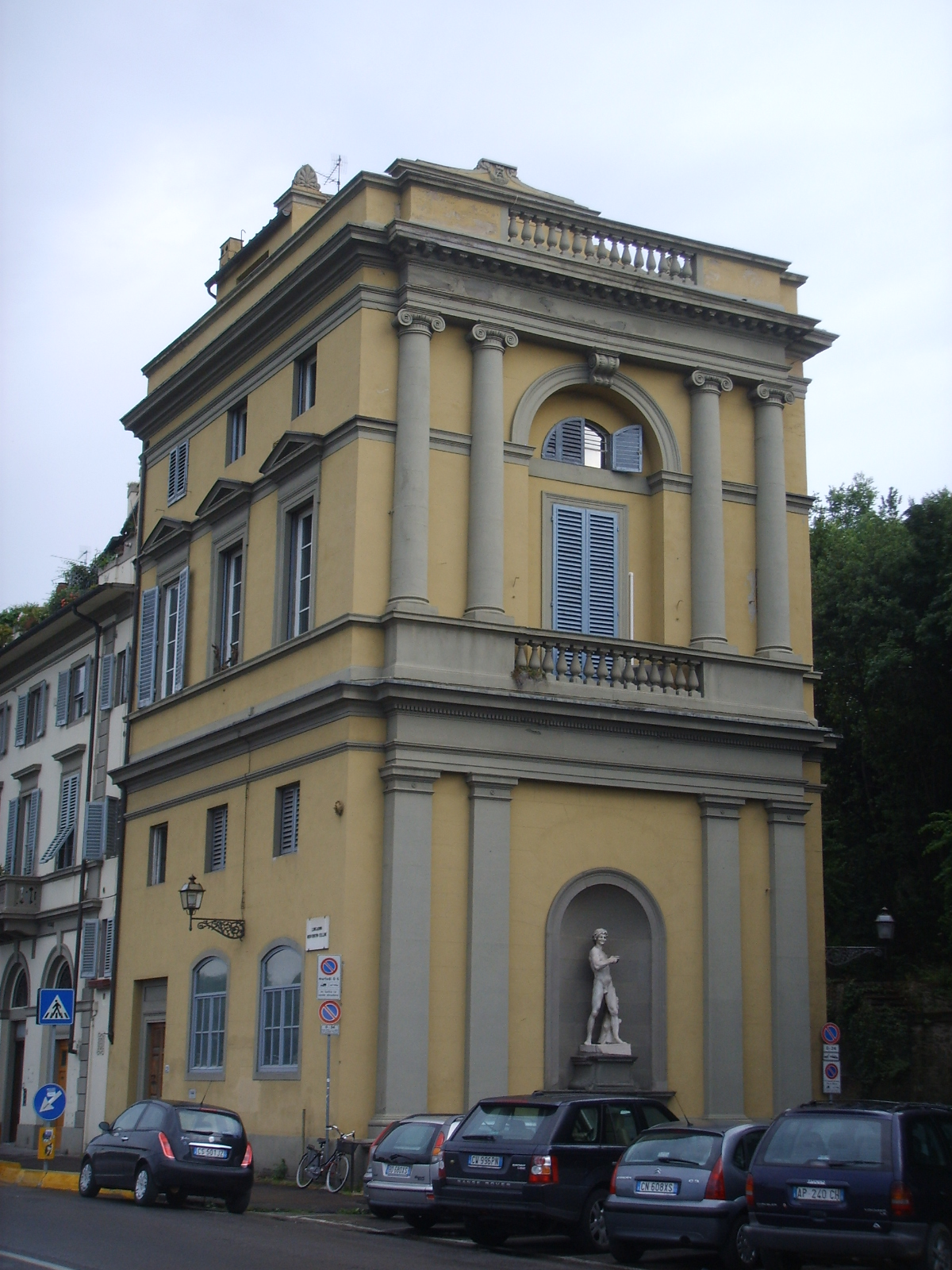 Palazzo sul Lungarno Benvenuto Cellini, a Firenze.